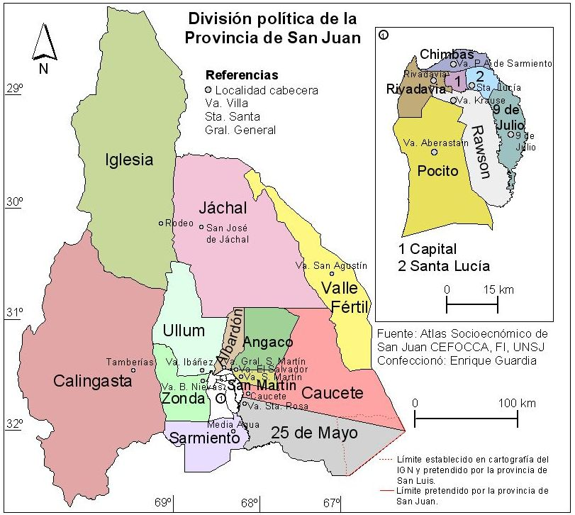 Mapa de la provincia de San Juan (Argentina) con su respectiva división política.